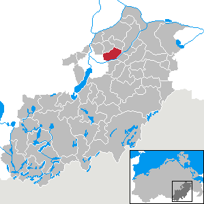 Neuenkirchen in Mecklenburg-Vorpommern, Landkreis Mecklenburg-Strelitz